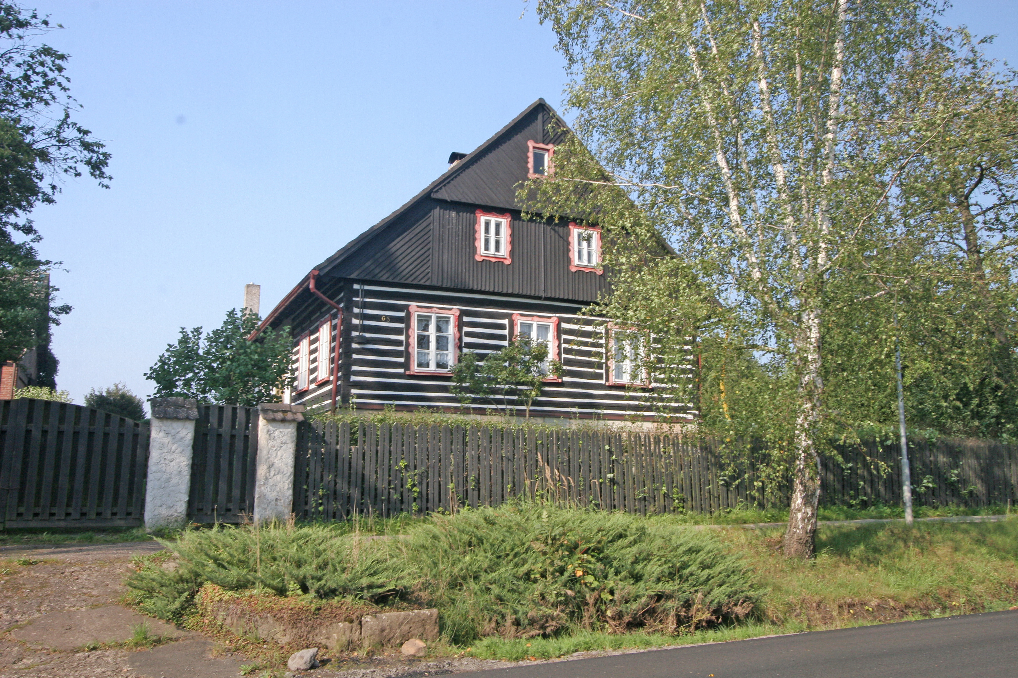 Huntířov čp. 65